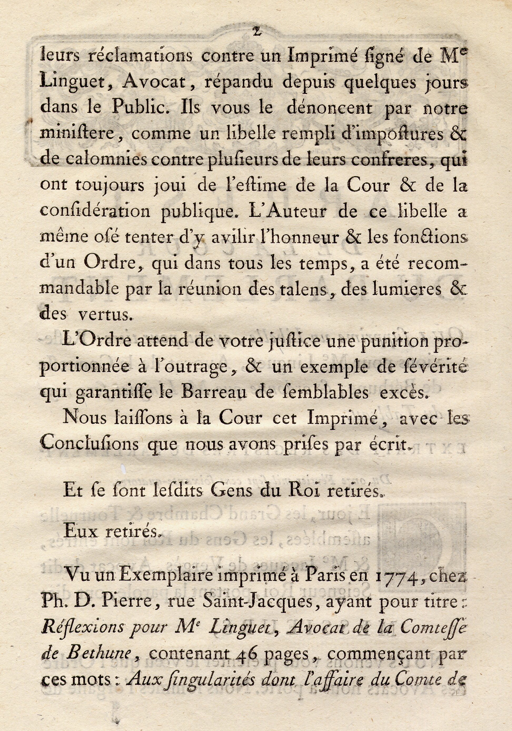 Arrest de la Cour du Parlement qui supprime un libelle de Linguet et le raye du Tableau, 11 février 1774, signé Nicolas Félix Vandive, page 2/3. Avocat général du roi Jacques de Vergès